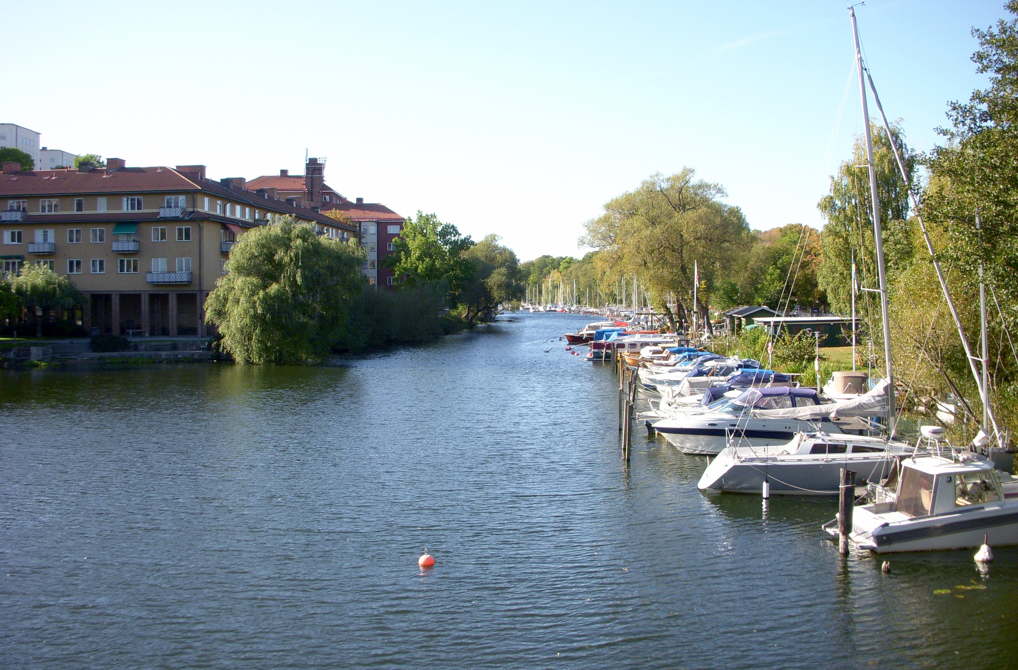 Långholmskanalen i Stockholm, vy västerut